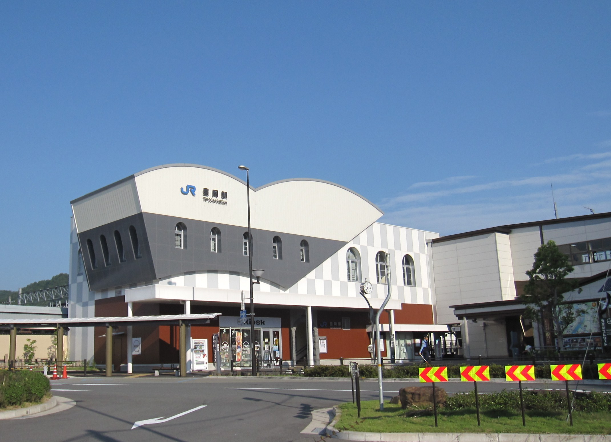 JR、北近畿タンゴ鉄道豊岡駅